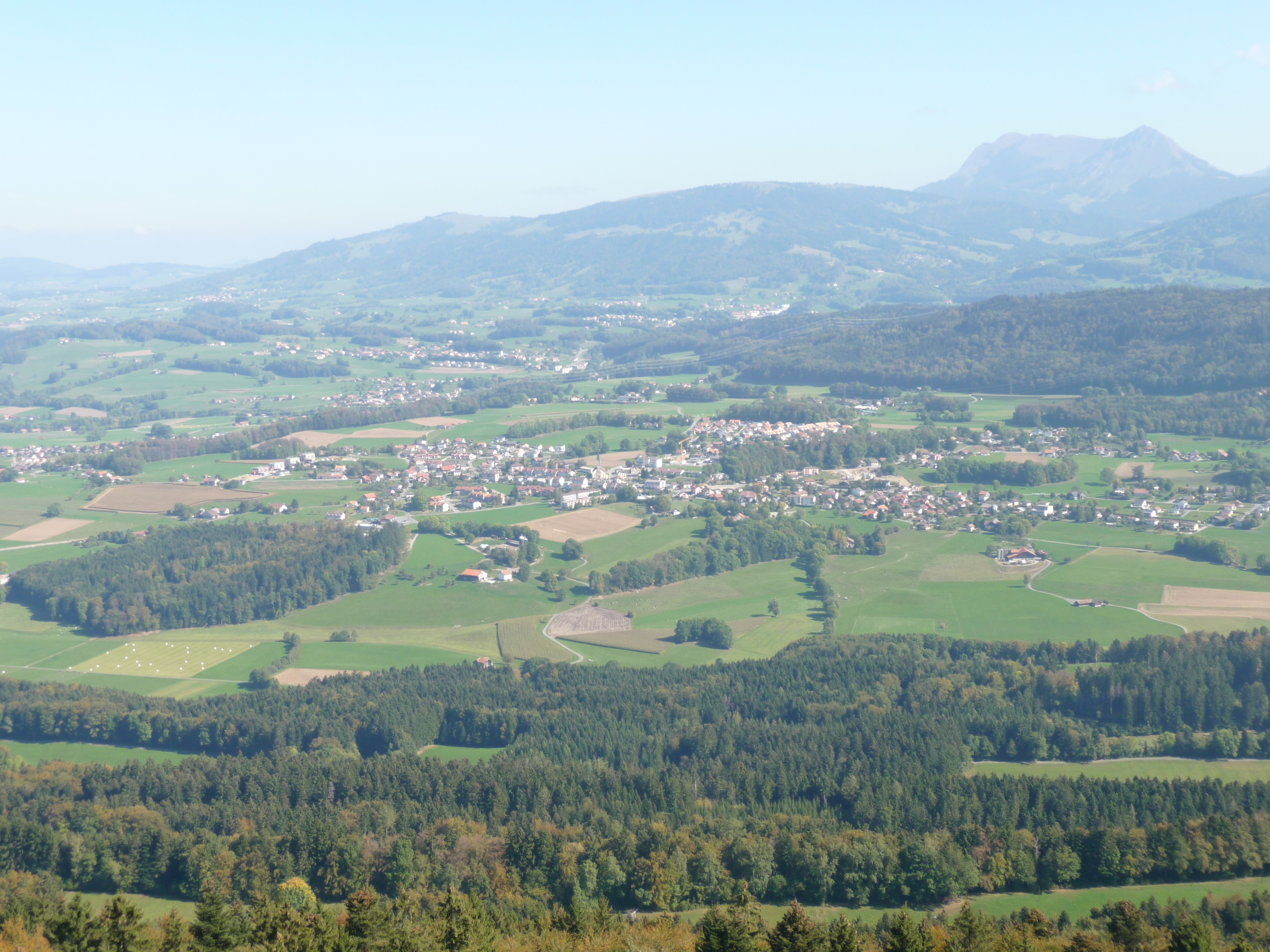 Blick auf Attalens in der Schweiz. Image d'Attalens en Suisse (Châtel-Saint-Denis au second plan) depuis la Tour relais du Mont Pèlerin